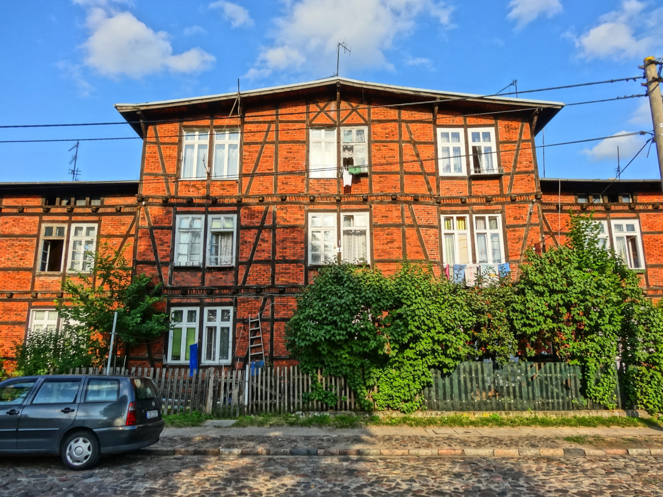 Osiedle Londynek (koszary wybudowane w latach 70. XIX w.) u wylotu ul. Pomorskiej w Bydgoszczy